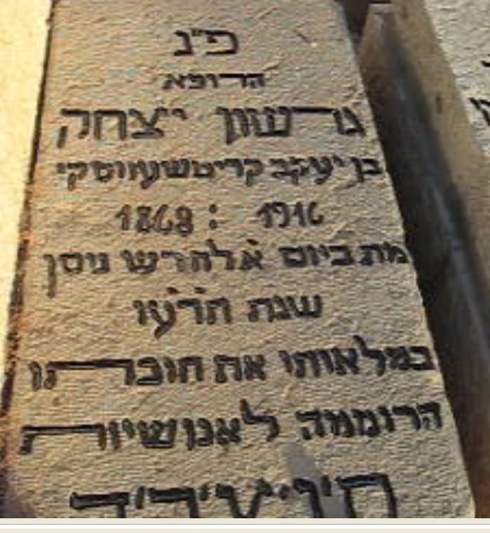 קברו של גרשון יצחק קריטשעווסקי